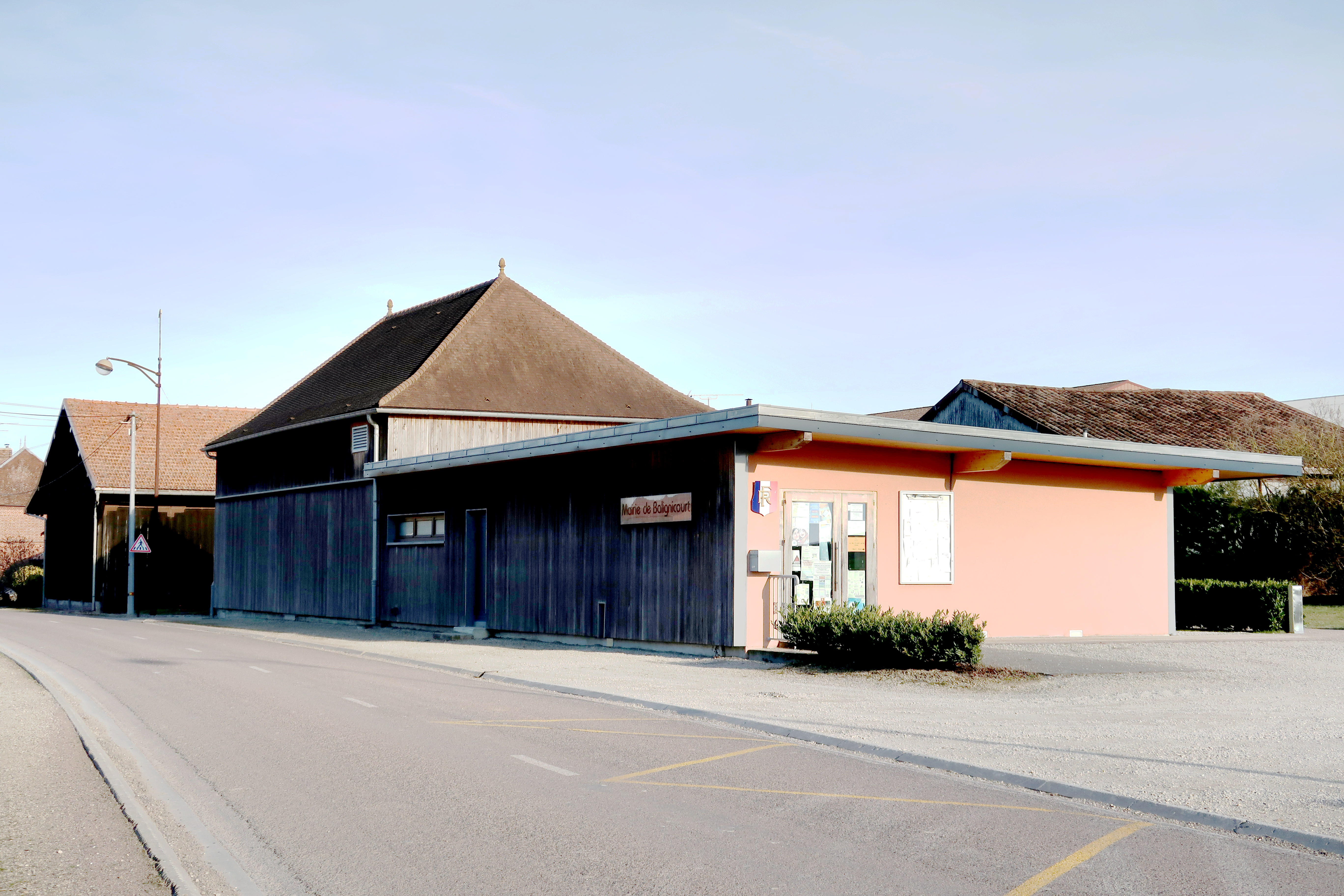 Balignicourt, mairie